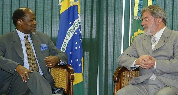 Brasília - Presidente Luiz Inácio Lula da Silva conversa com o presidente de Moçambique, Joaquim Chissano, durante encontro no Palácio do Planalto,(Ricardo Stuckert/PR)